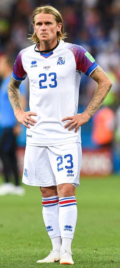 Сборная Исландии уступает Хорватии и покидает ЧМ-2018